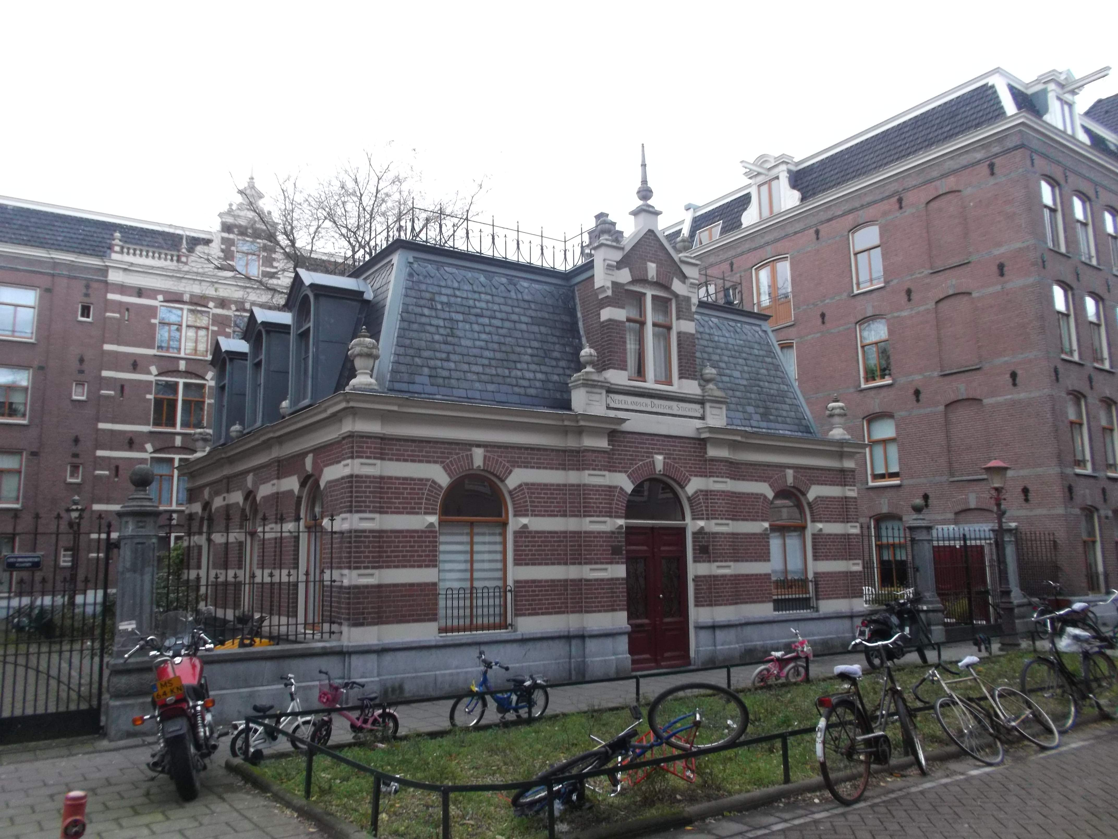 P.W. Janssenhofje, Da Costastraat 38-58, Jordaan, Amsterdam. Voormalige Nederlandsch-Duitsche Stichting. Gemeentelijk momument (nr ?). 1895 Willem Hamer jr. (architect)